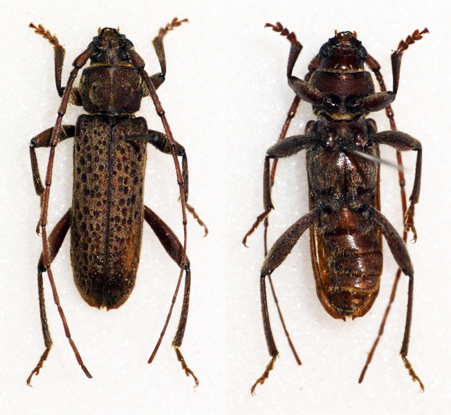 Gerstaecker,1884 Sex: ? Data: 10-12-2006 - Singada - Tanzania Size: ?